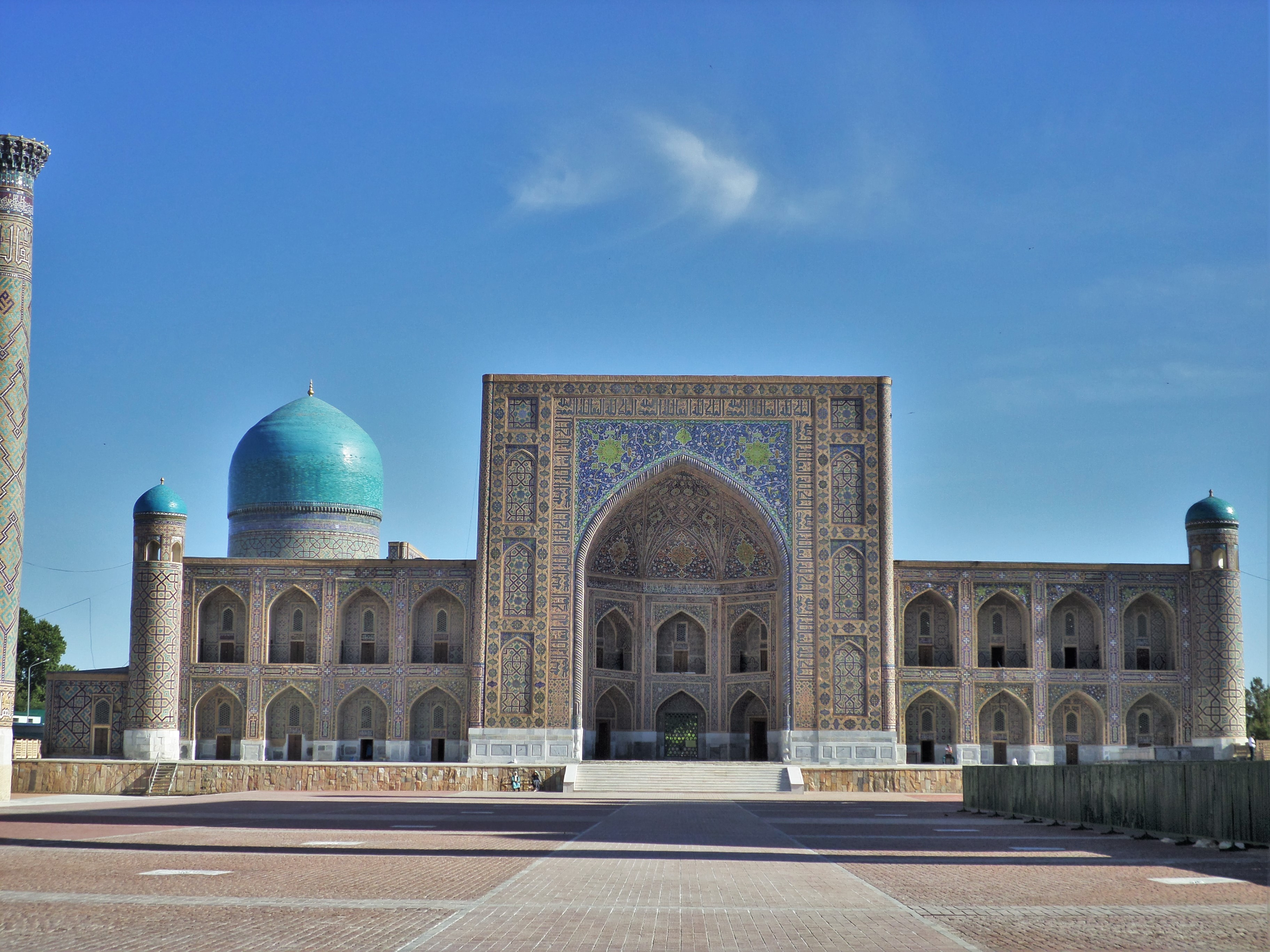 Registan Tillya-Kari madrasah Медресе Тилля-Кари2014г.